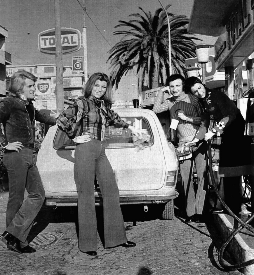 Italian group Ricchi e Poveri